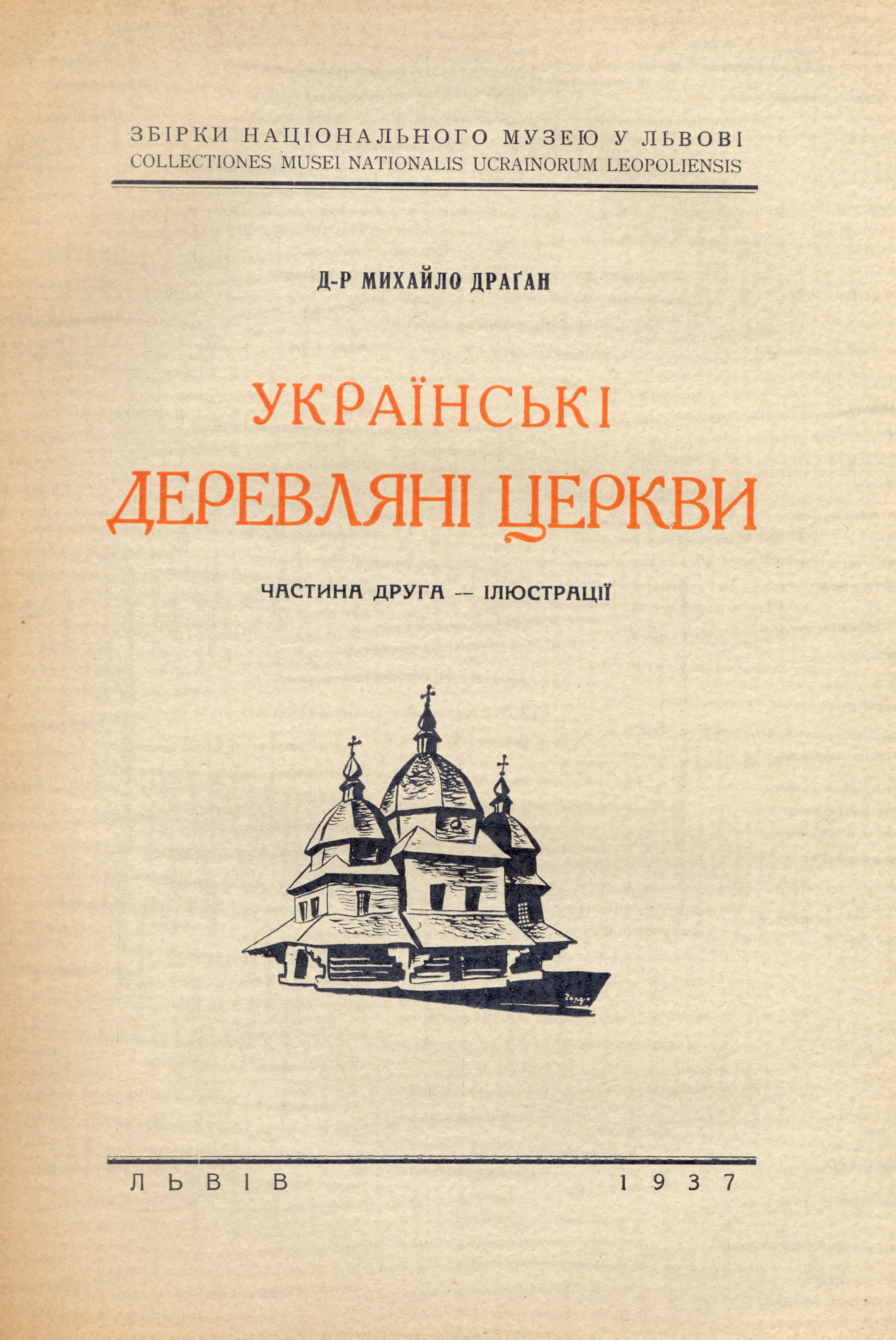 Обкладинка книги д-ра М. Драгана "Українські деревляні церкви. Частина друга - Ілюстрації": Обкладинка книги д-ра М. Драгана "Українські деревляні церкви: Генеза і розвій форм// Збірки Національного музею у Львові. — Львів, 1937. — Ч.2. — XVI + 136 с."